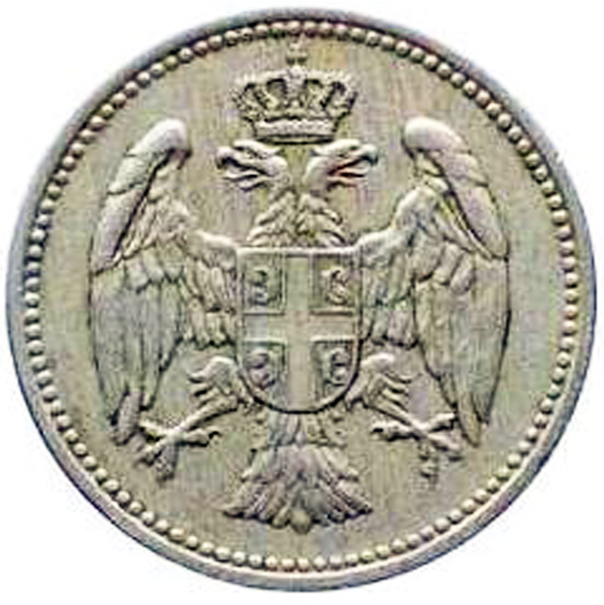 Srpski (latinica): Avers 20 para iz 1912. godine, Kraljevina Srbija